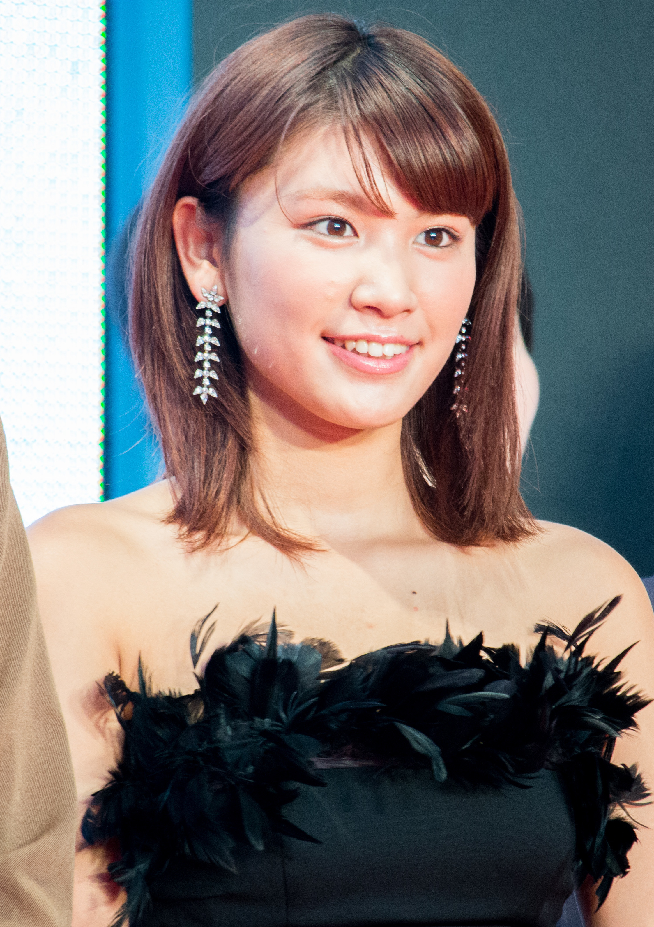 第28回 東京国際映画祭 オープニングセレモニー 久松郁実 (桜ノ雨)